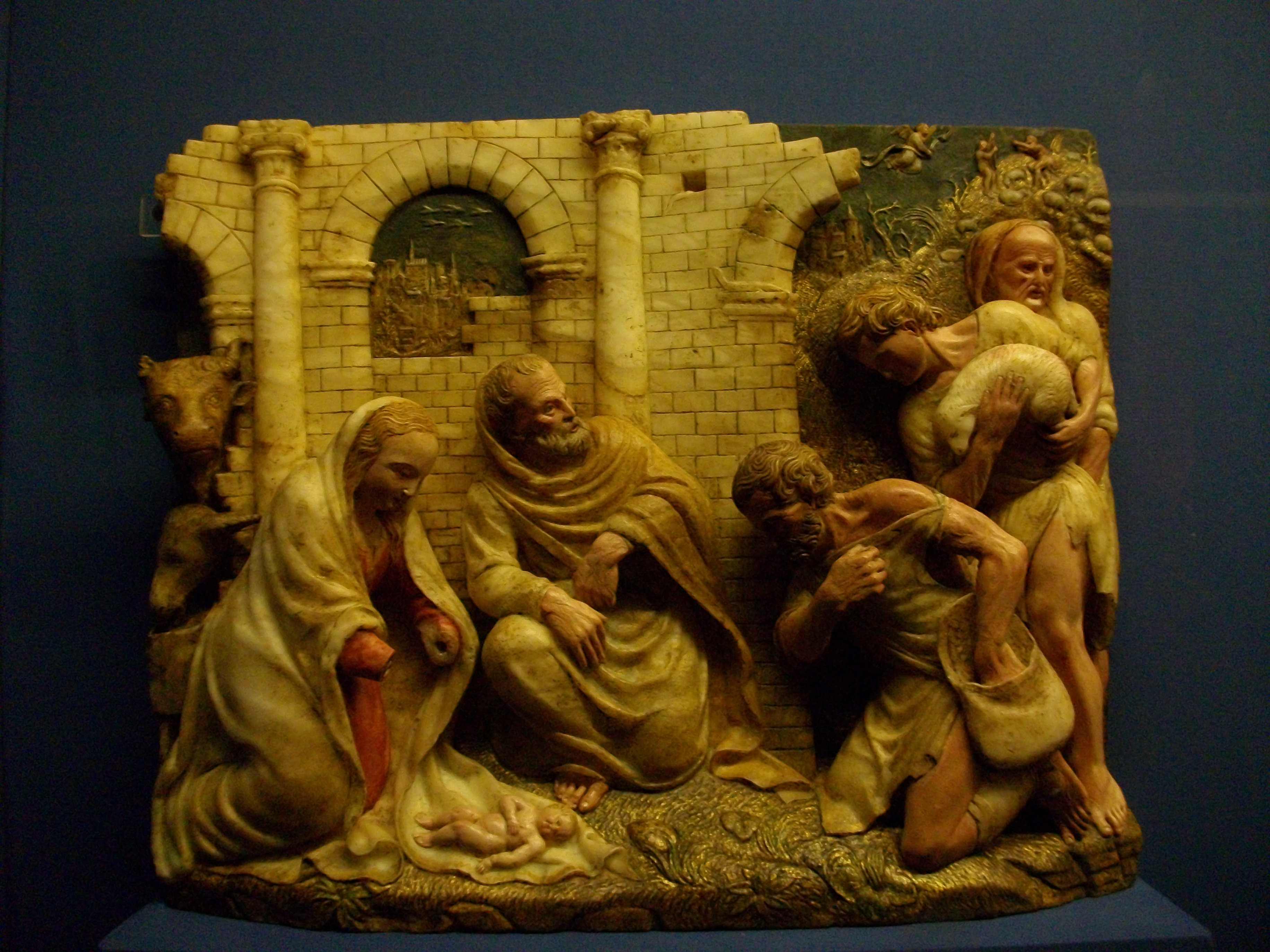 Adoració dels pastors, obra de Damià Forment, dècada de 1520-1530. Procedent de l'església de Sant Jaume de Sobradiel. Exposició temporal al Museu de Belles Arts de València